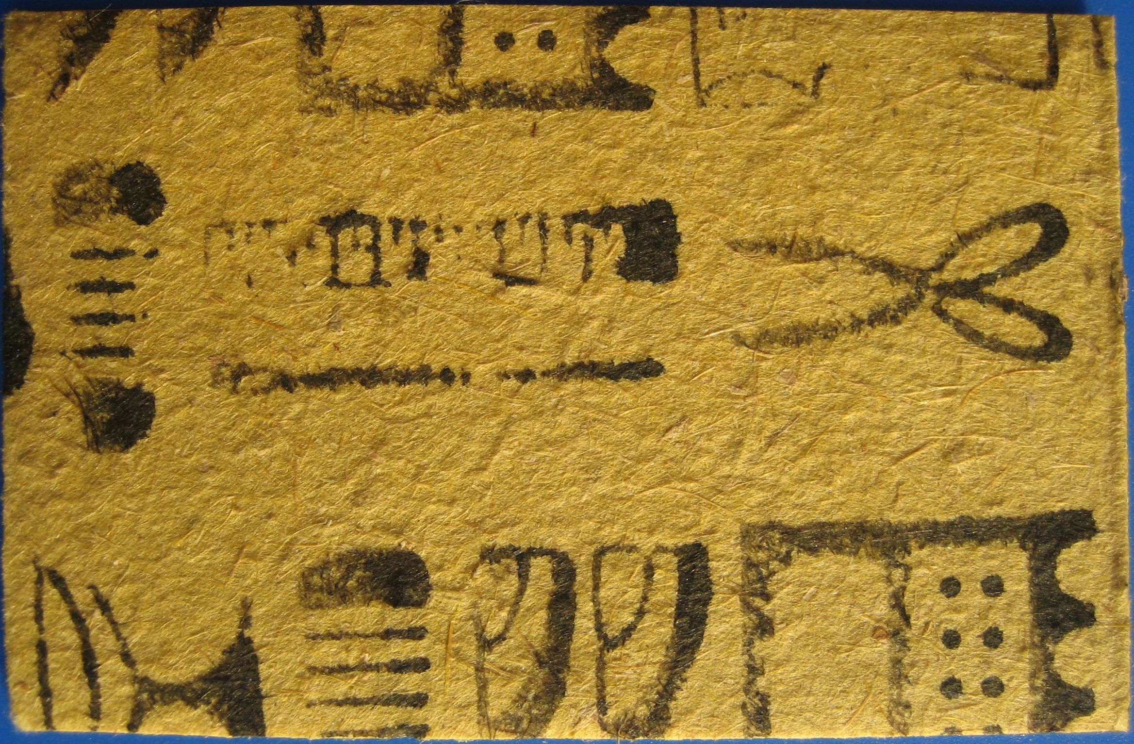 特殊的準紙錢